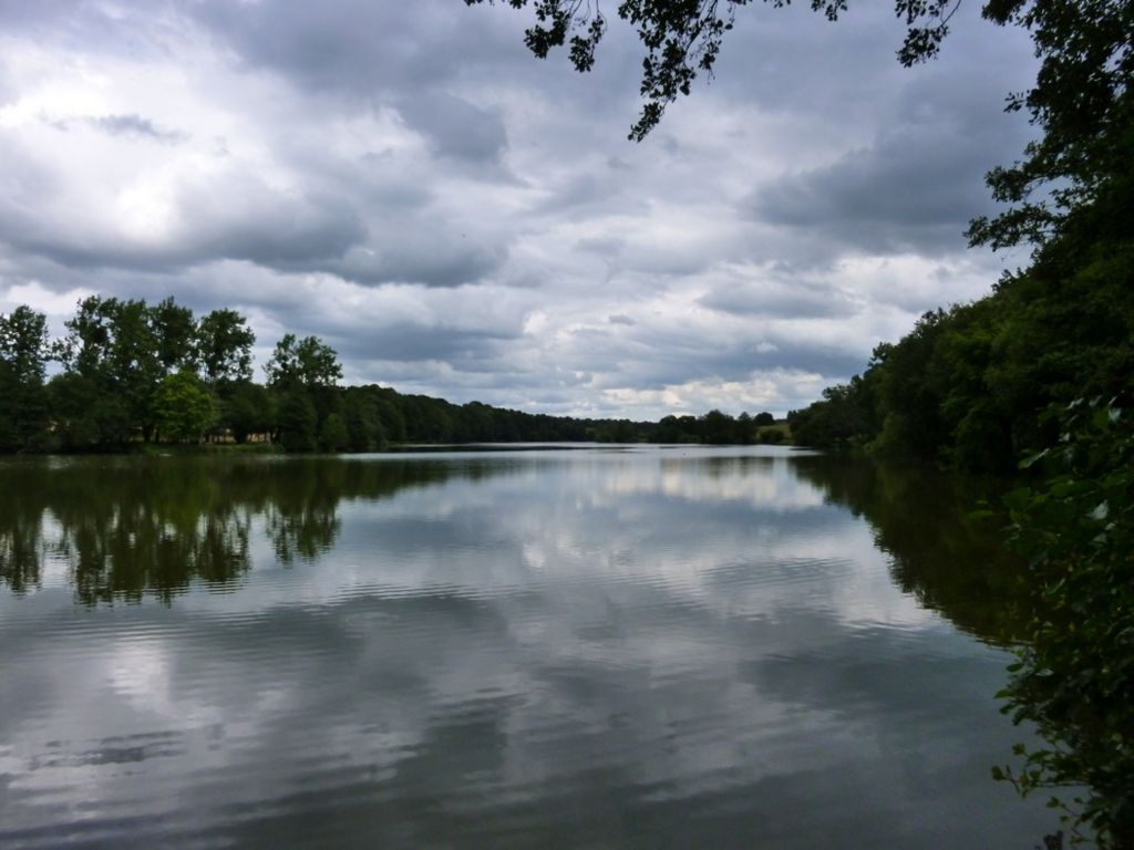 étang de Chevré (La Bouëxière Ille-et-Vilaine)